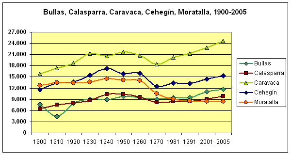 Población en el contexto de los municipios de la comarca. Calasparra, en granate, sigue una línea paralela sobre todo a la de Bullas. The population of Bullas, Calasparra, Caravaca de la Cruz, Cehegin (Cehegín) and Moratalla ("comarca del Noroeste" in Murcia, Spain), (1900-2005). See this one for the non directly comparative one. Own work, given to PD.